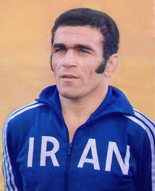 Ramezan Kheder